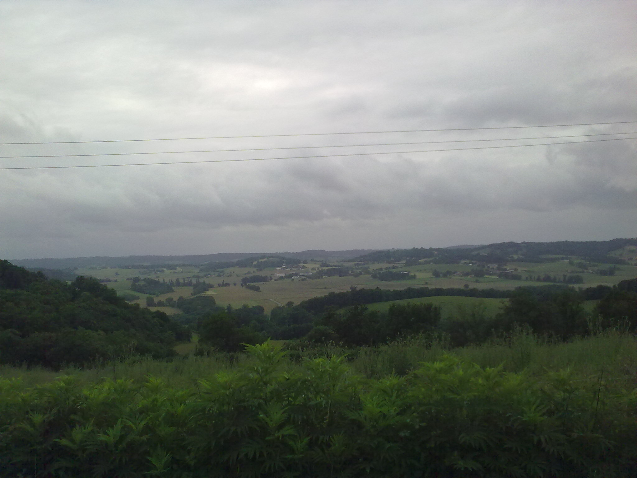 Aubous